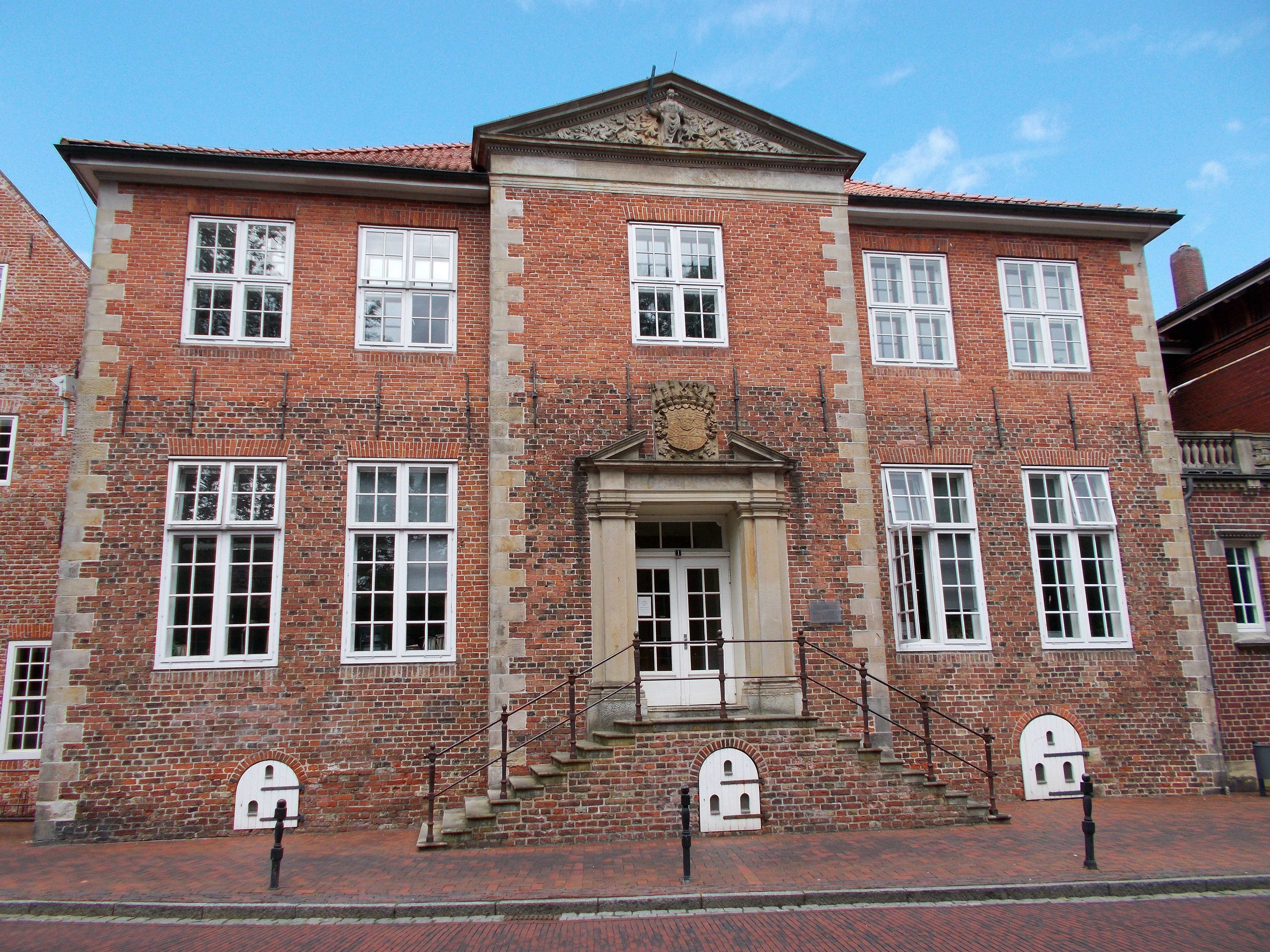 Denkmalgeschütztes Amtsgericht in Jever, Anno 1703/04